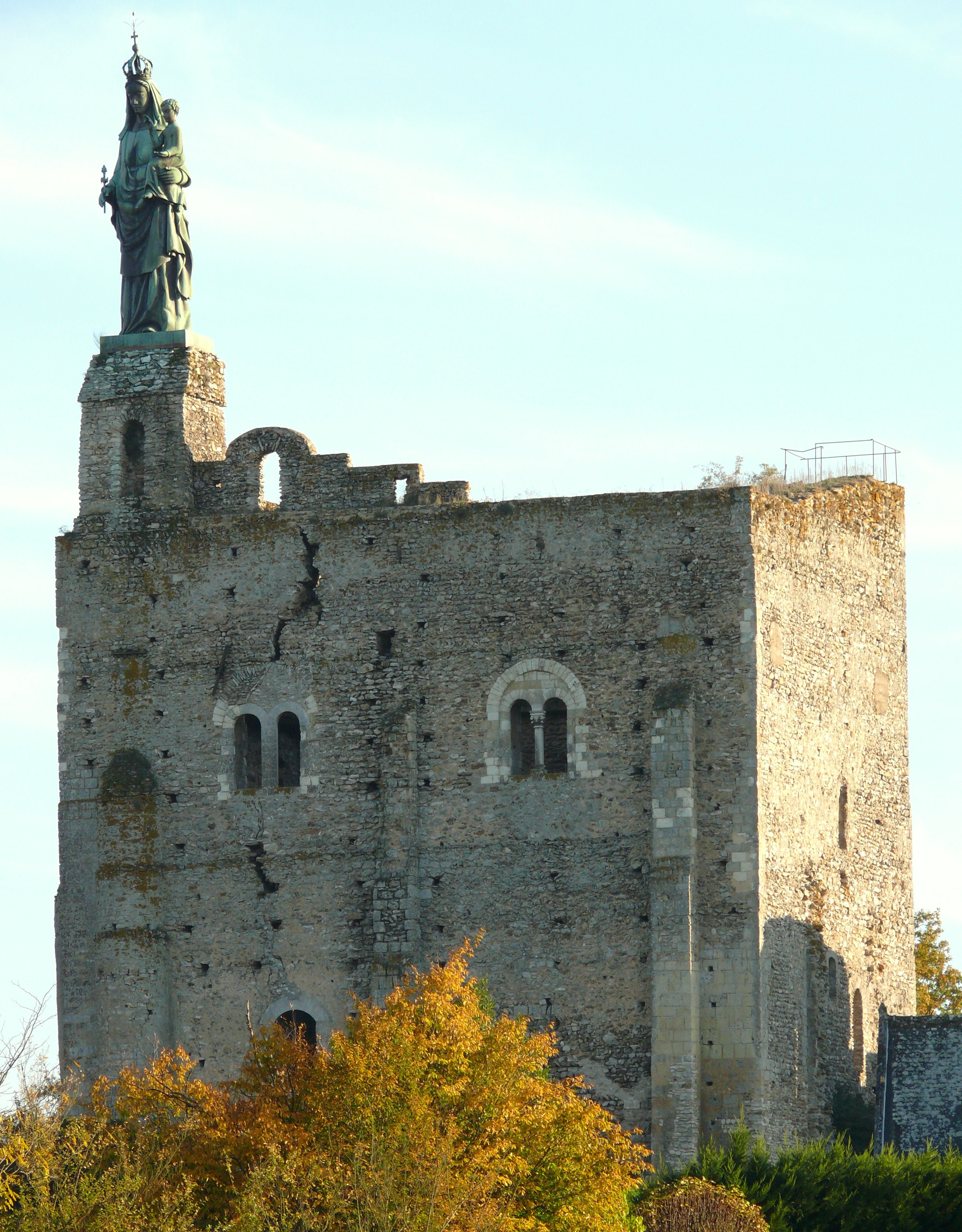 Montbazon - Donjon